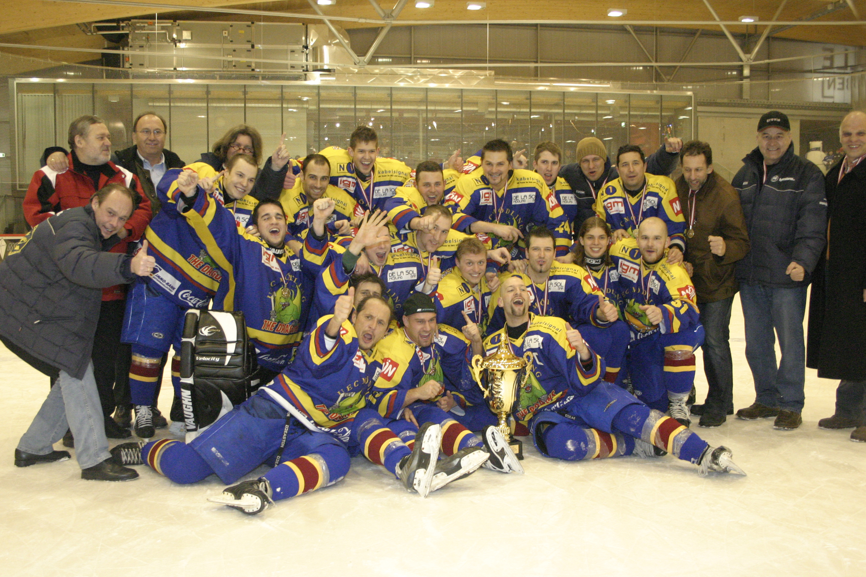 Der UEC vor dem Meistertitel